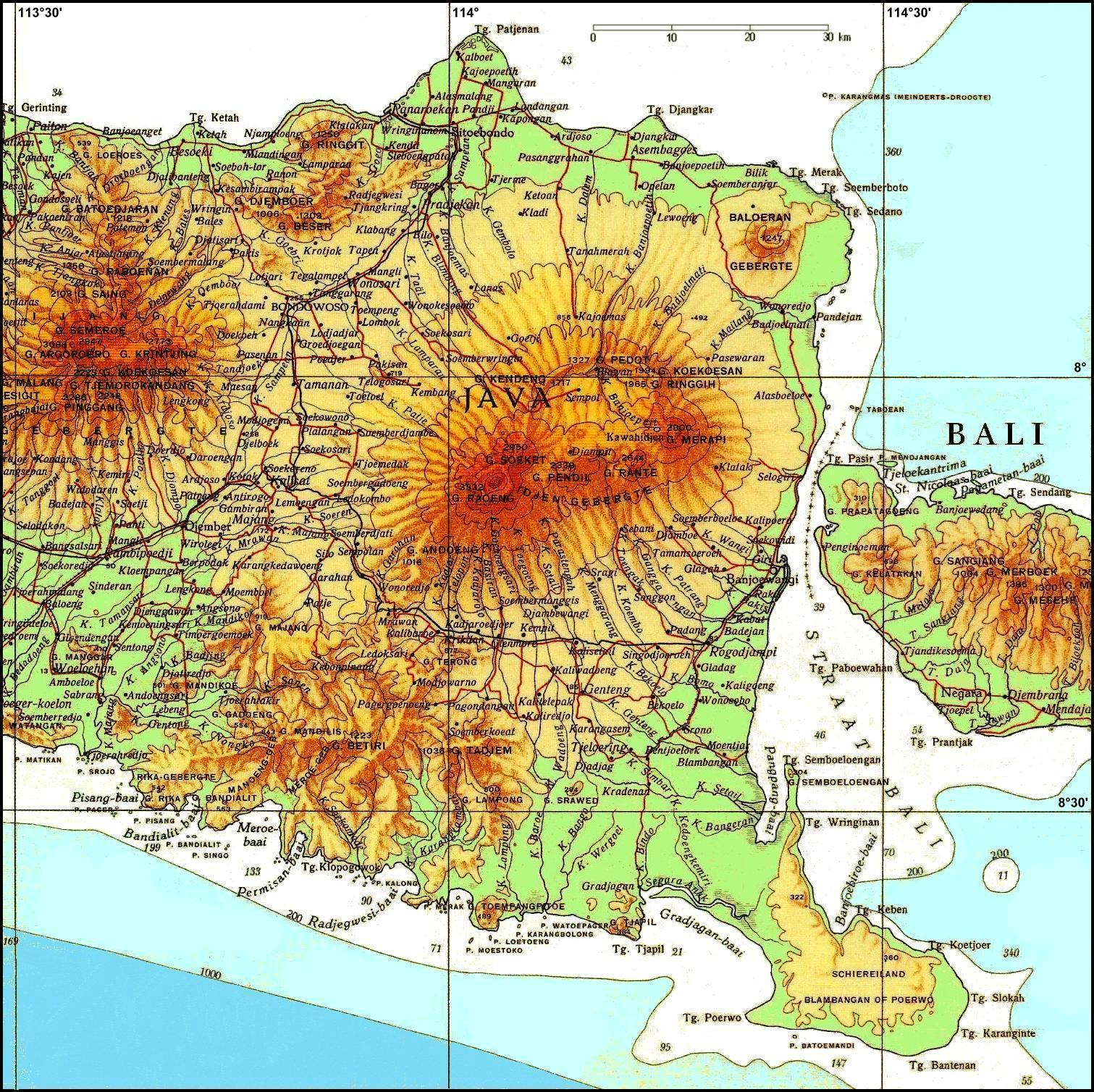 Ijen und Umgebung